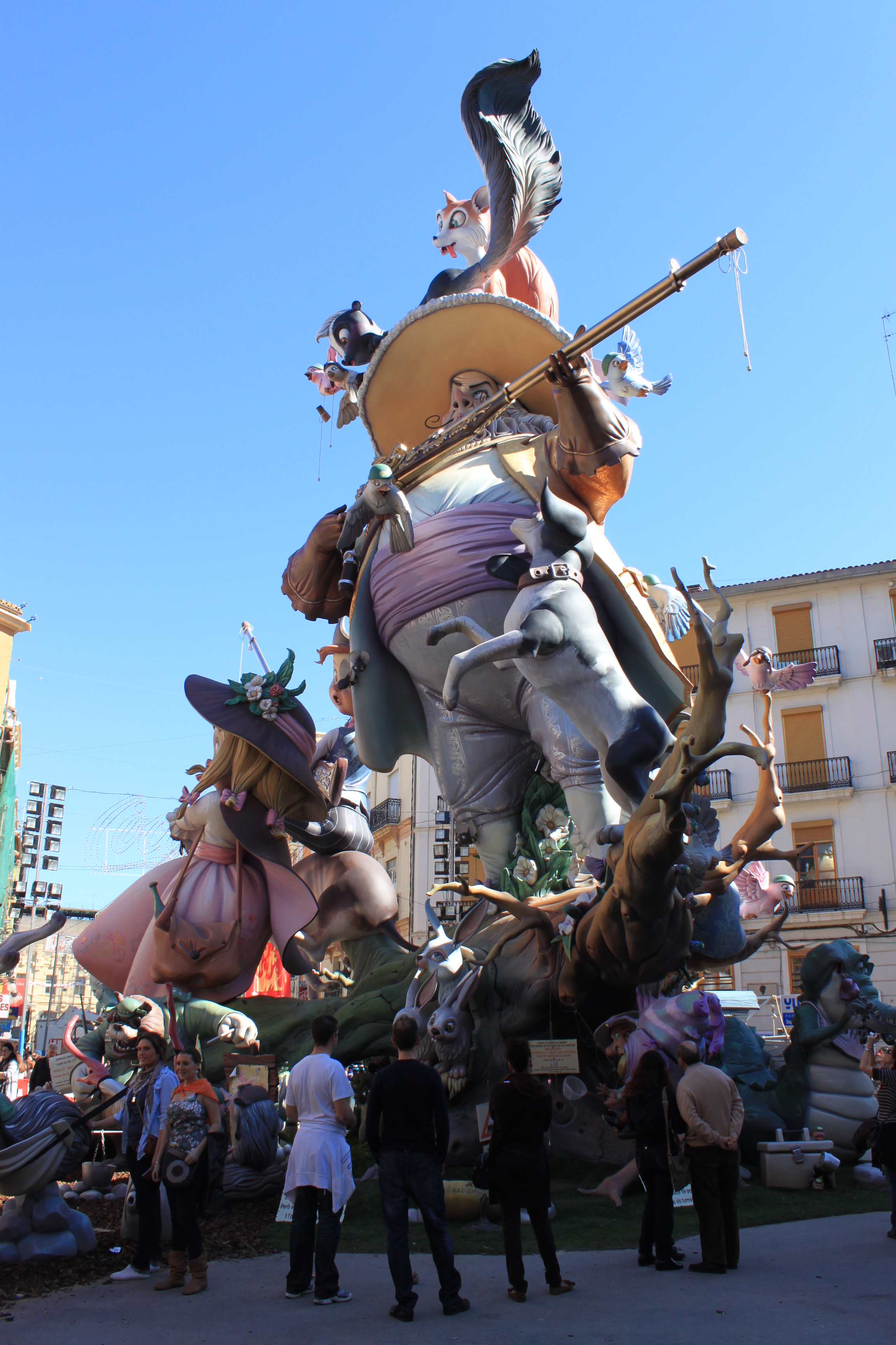 Fallas 2011 Valencia, falla Convento Jerusalén